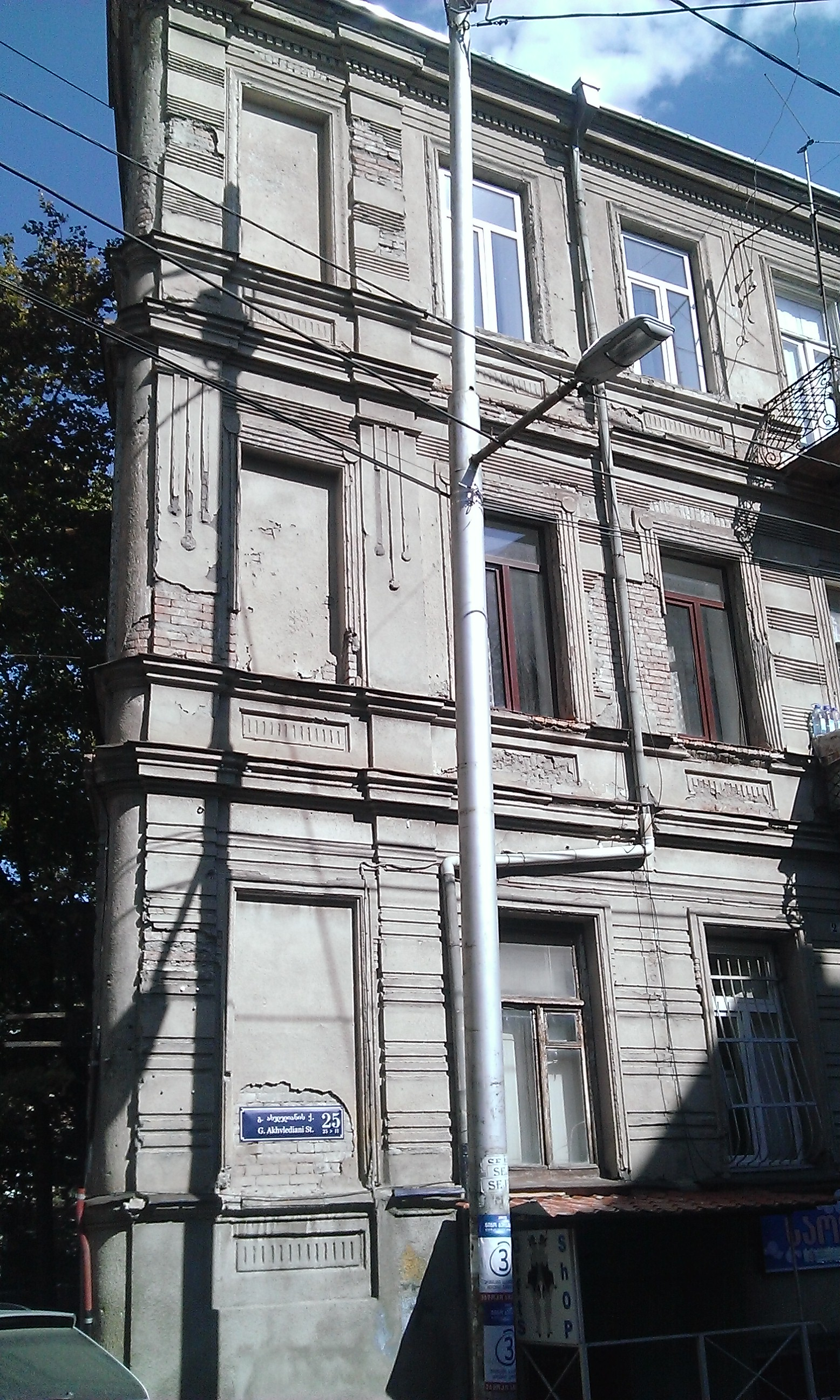 საცხოვრებელი სახლი, ახვლედიანი გიორგის ქუჩა 25